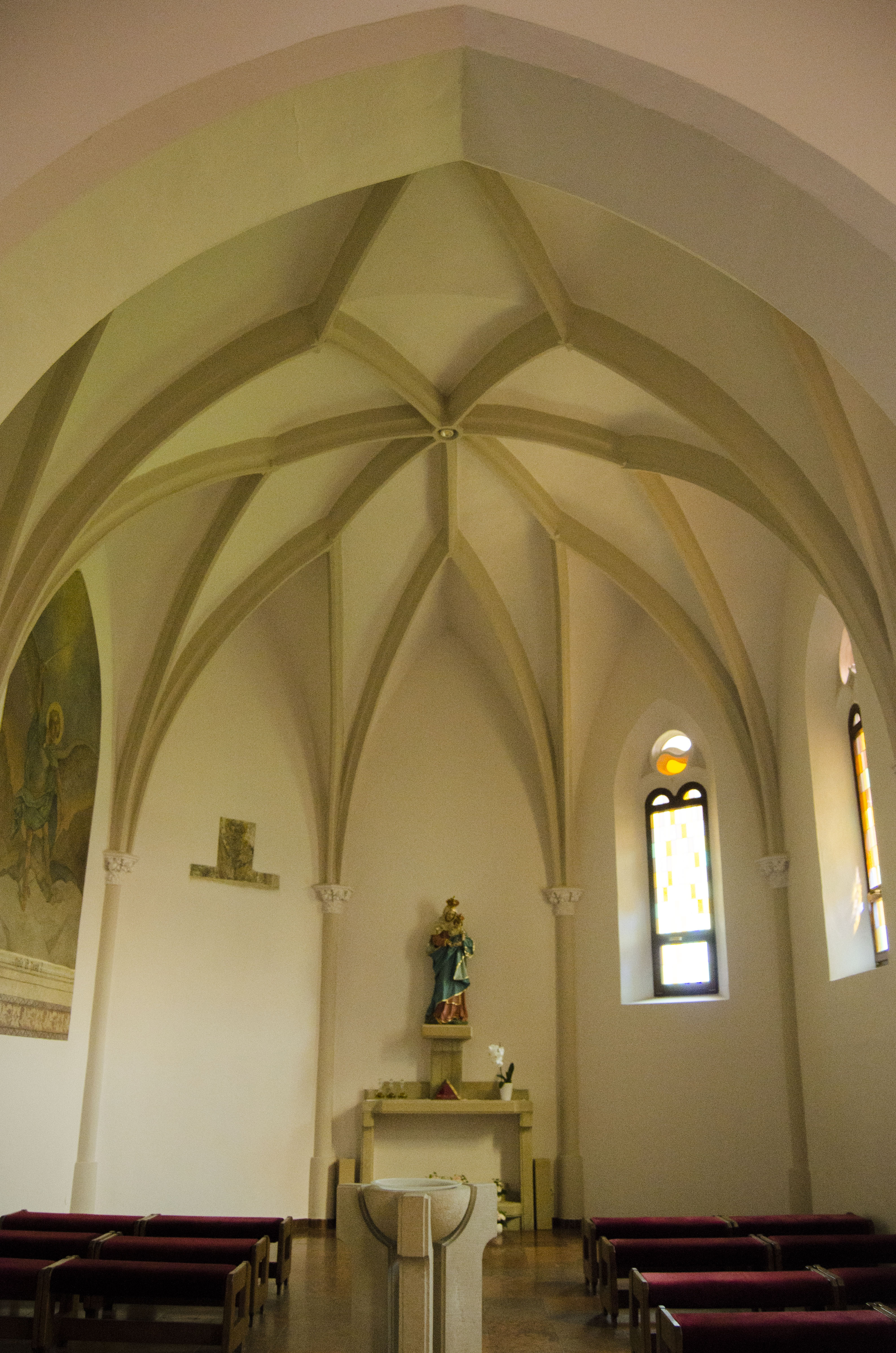 Kostol sv. Petra a Pavla v Barci_interiér 2019